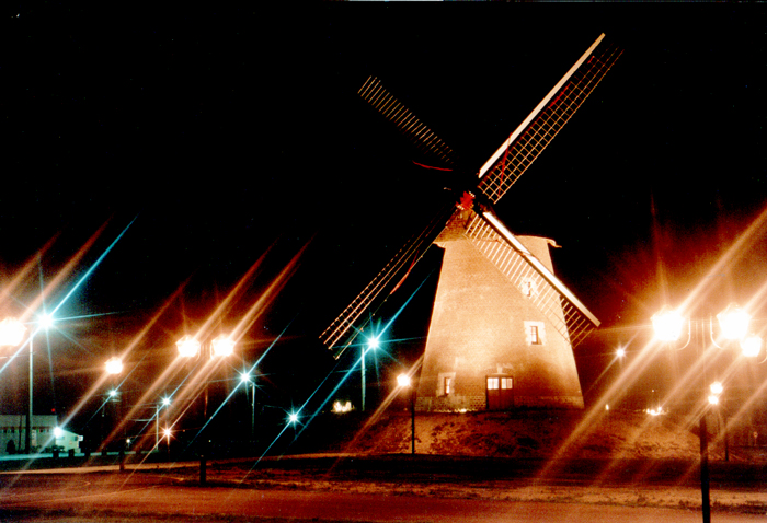 Windmühle Achicourt